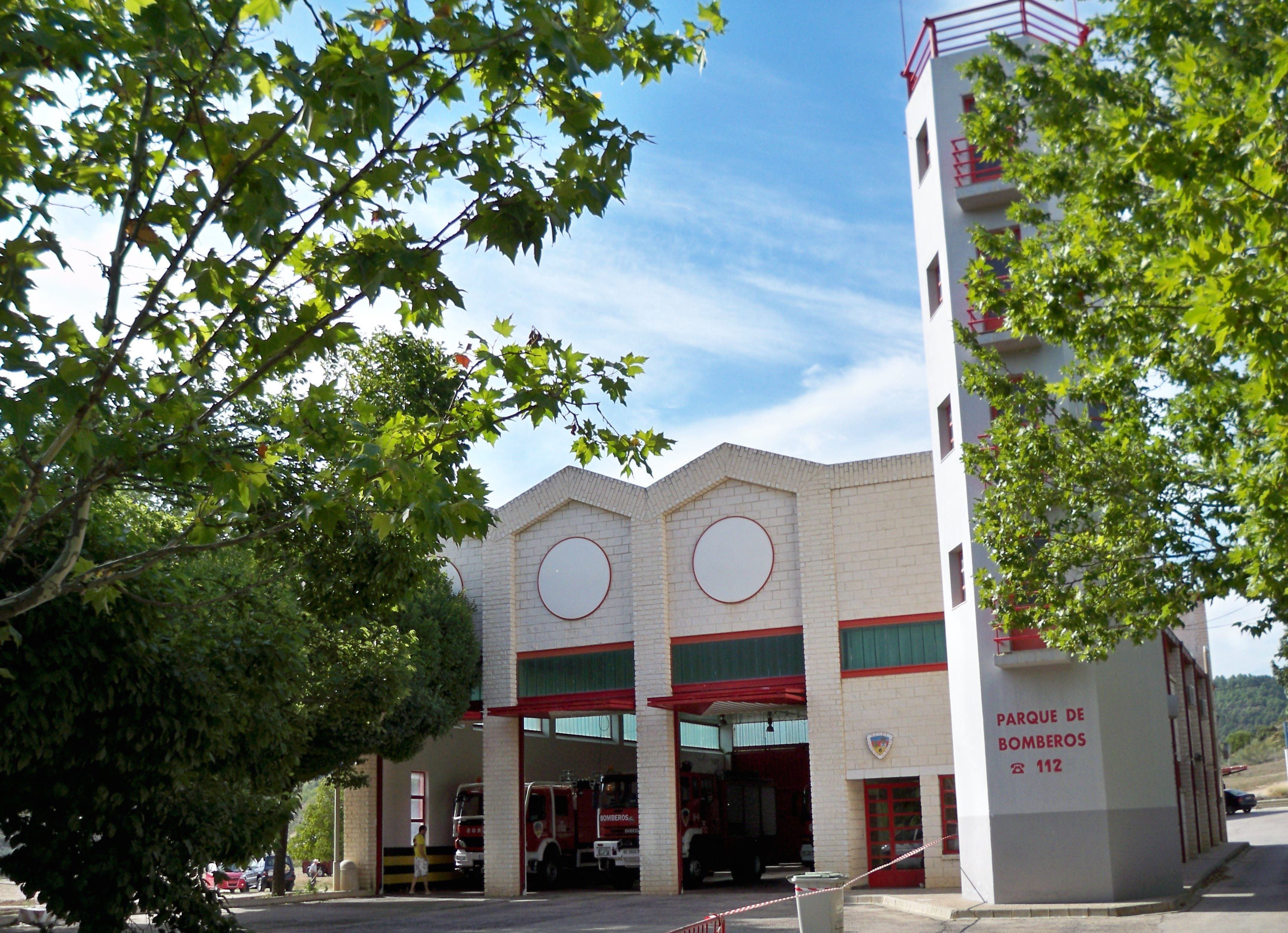 Fotografía del Parque Comarcal de Bomberos de Molinicos.